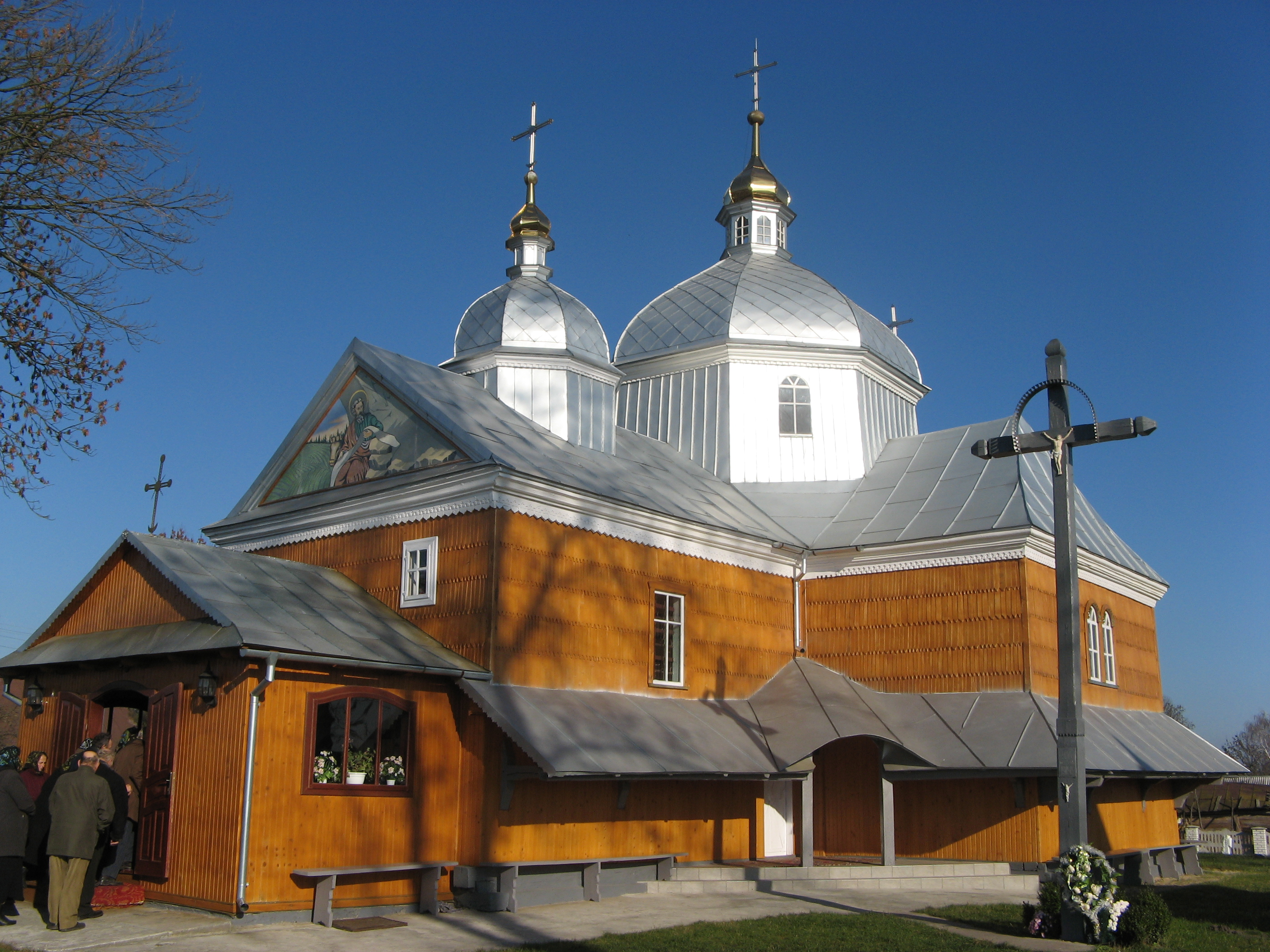 Церква Св. Луки (дер.), Корсів, 1743 р.